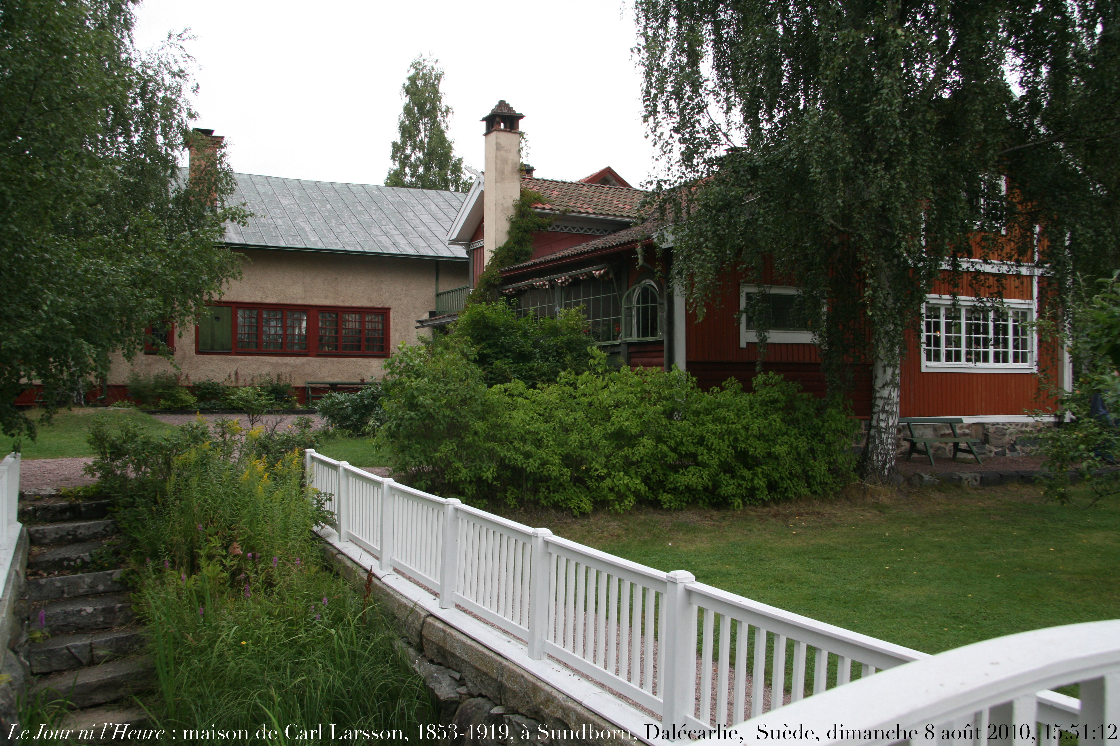 Lilla Hyttnäs